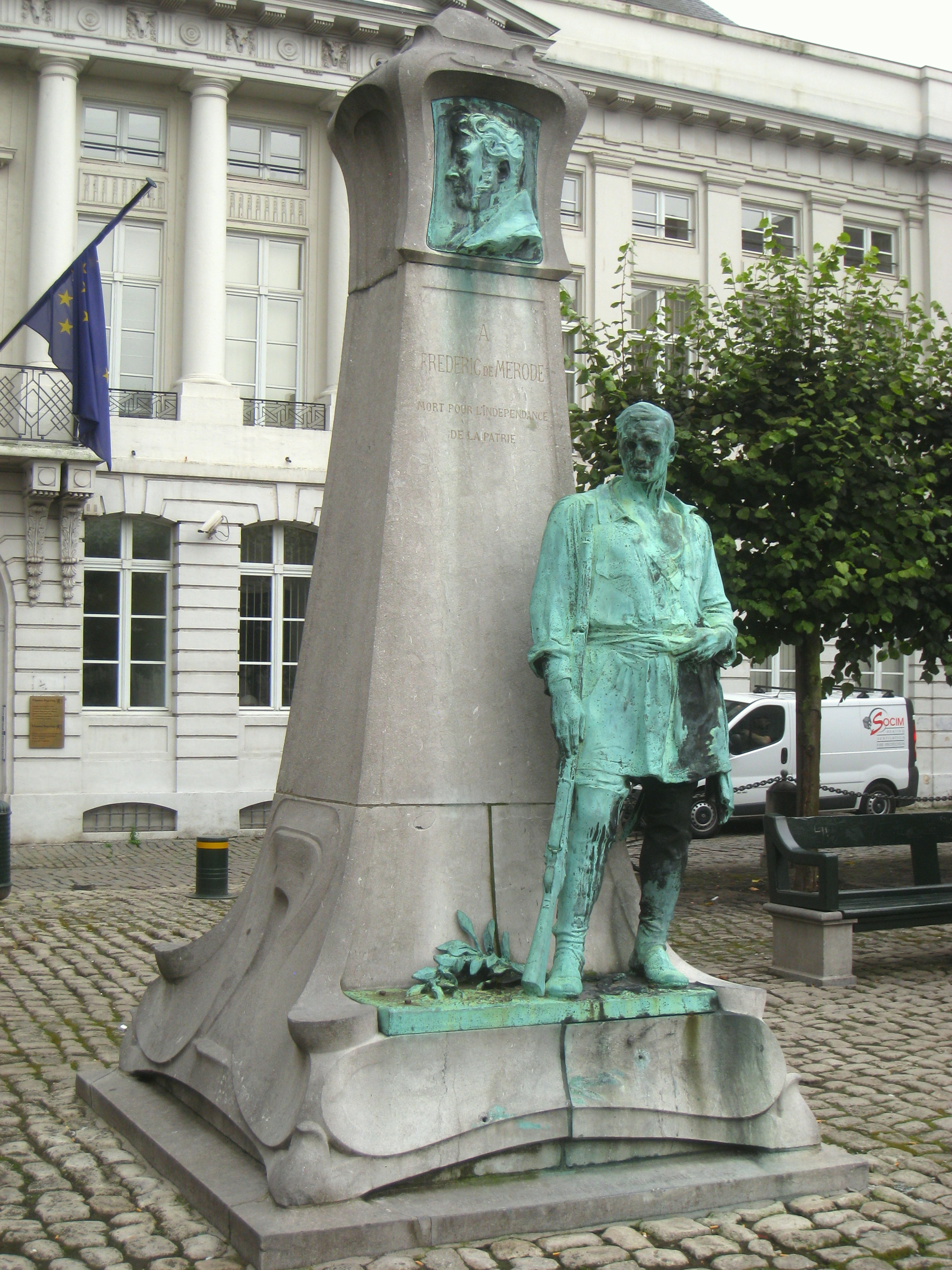 Frédéric de Mérode memorial, Place des Martyrs/Martelaarsplein, Brussels, Belgium.